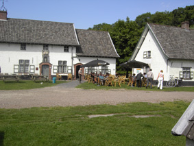 Drongengoedhoeve 1746